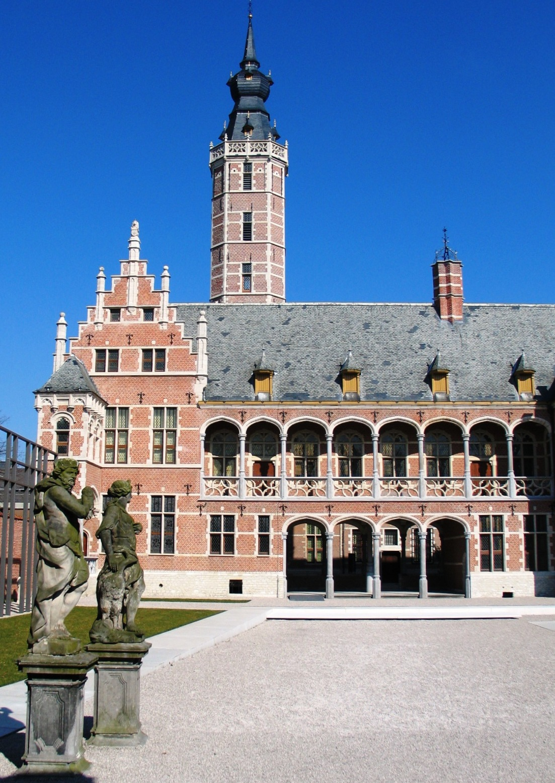 Hof van Busleyden in Mechelen - eigen foto